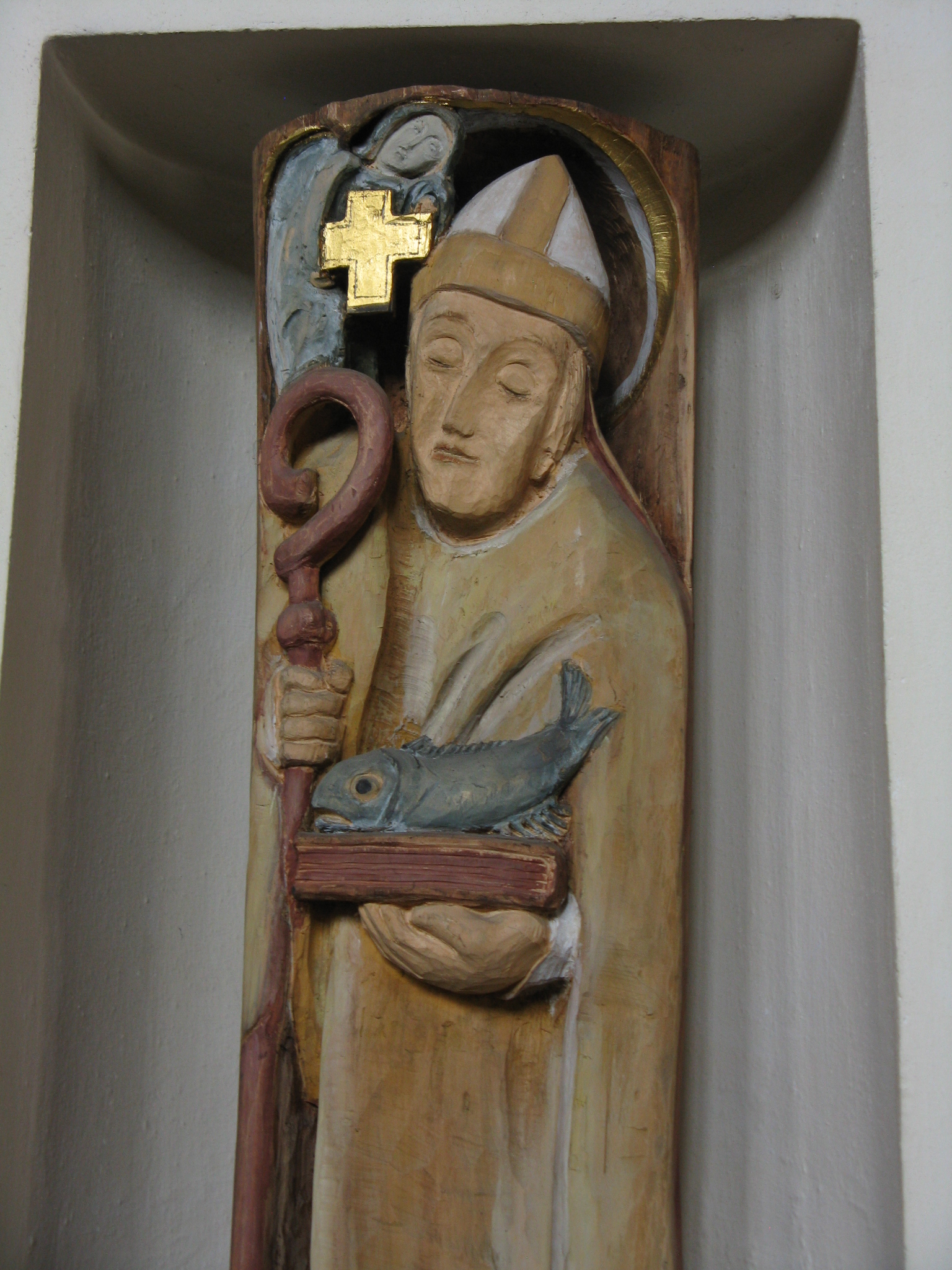 Heiliger Ulrich. Pfarrkirche Sankt Margaretha in Reichertshofen. Künstlerin: Bernardine Weber (1919 - 2012), Holzrelieftechnik, 1982.